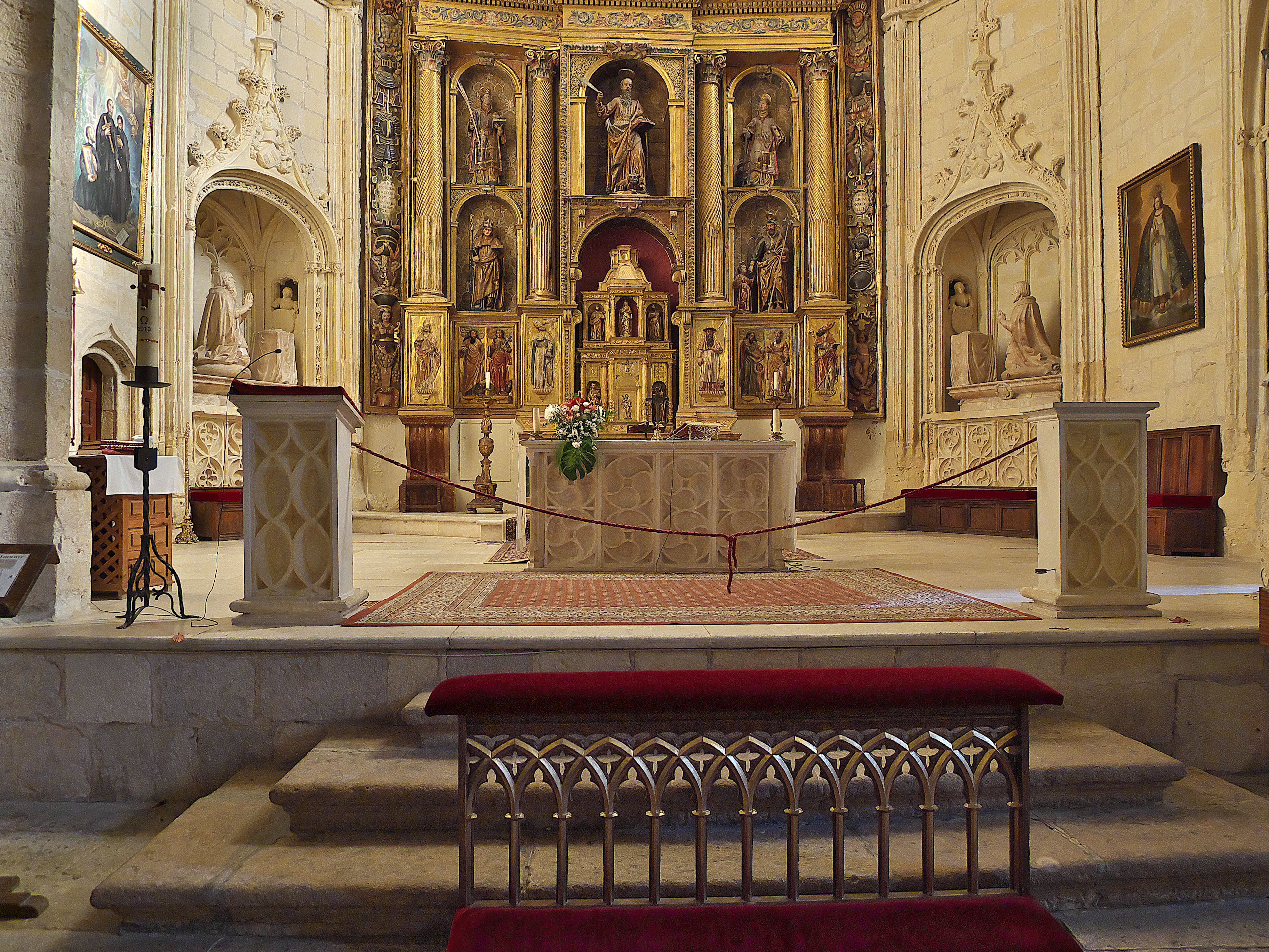 Juan Fernández Pacheco, primer Señor de Belmonte, esposo de Inés Téllez de Meneses, protectores de la parroquial de San Bartolomé, eligen la iglesia como panteón familiar. También guardan sepultura, su hija María Pacheco y esposo Alonso Téllez Girón (+1449), y nieta Guiomar Pacheco de Avilés.